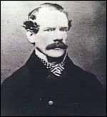 Francis Cadell, explorateur britannique